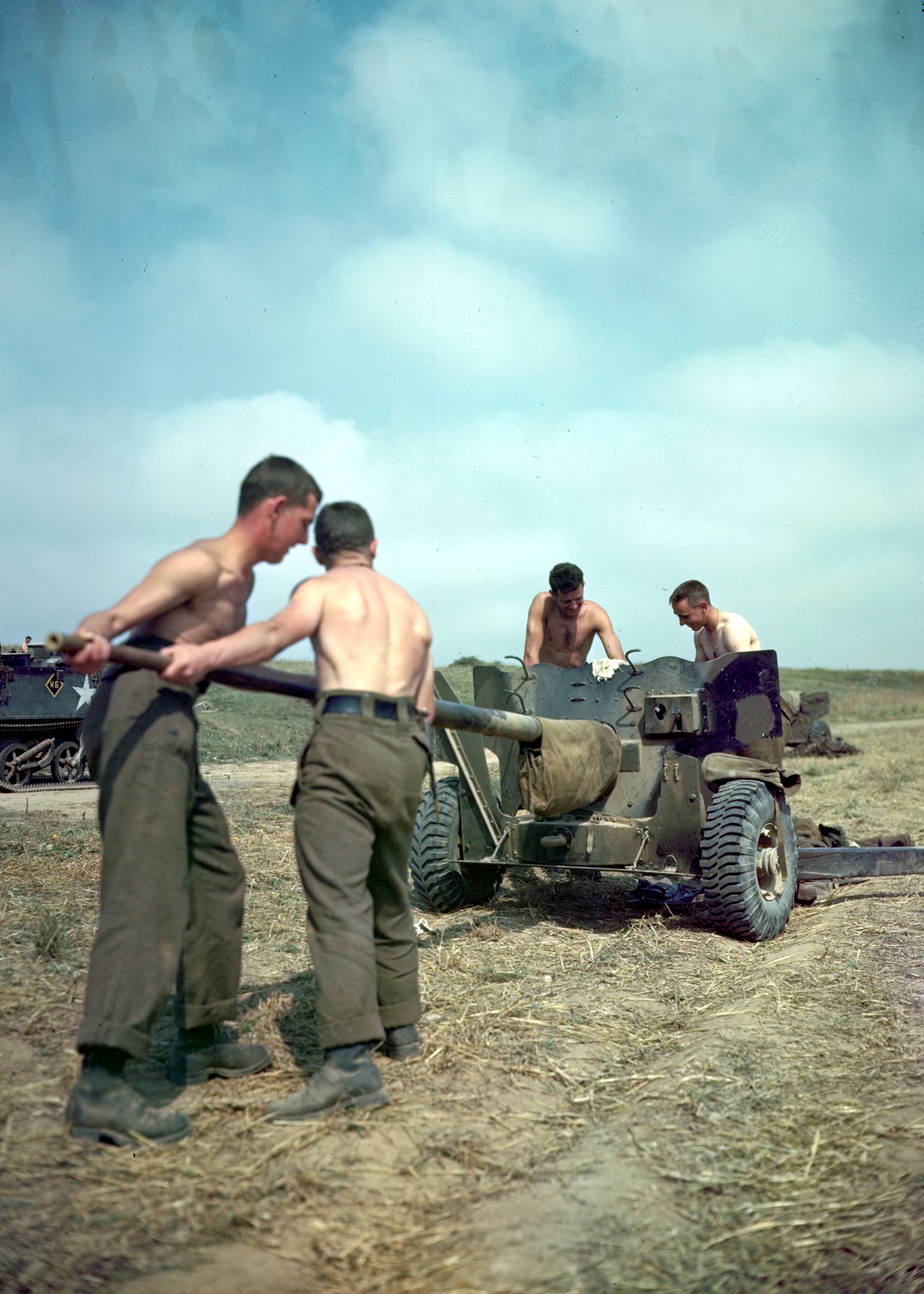 Ces soldats canadiens nettoient ce canon antichar avant de continuer à combattre.